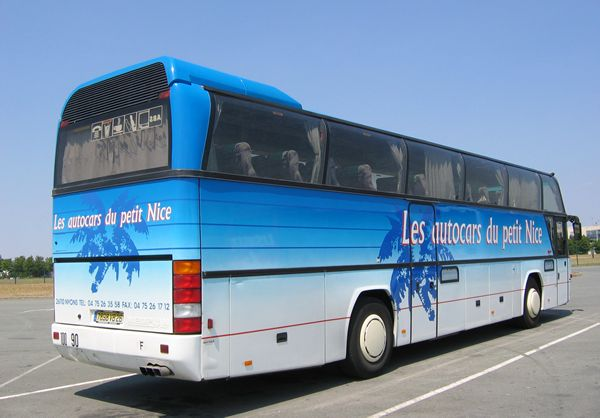 Autobus Neoplan Cityliner des "Autocars du petit Nice". - Licence GFDL. Auteur : Olivier MEYER Olivier Meyer